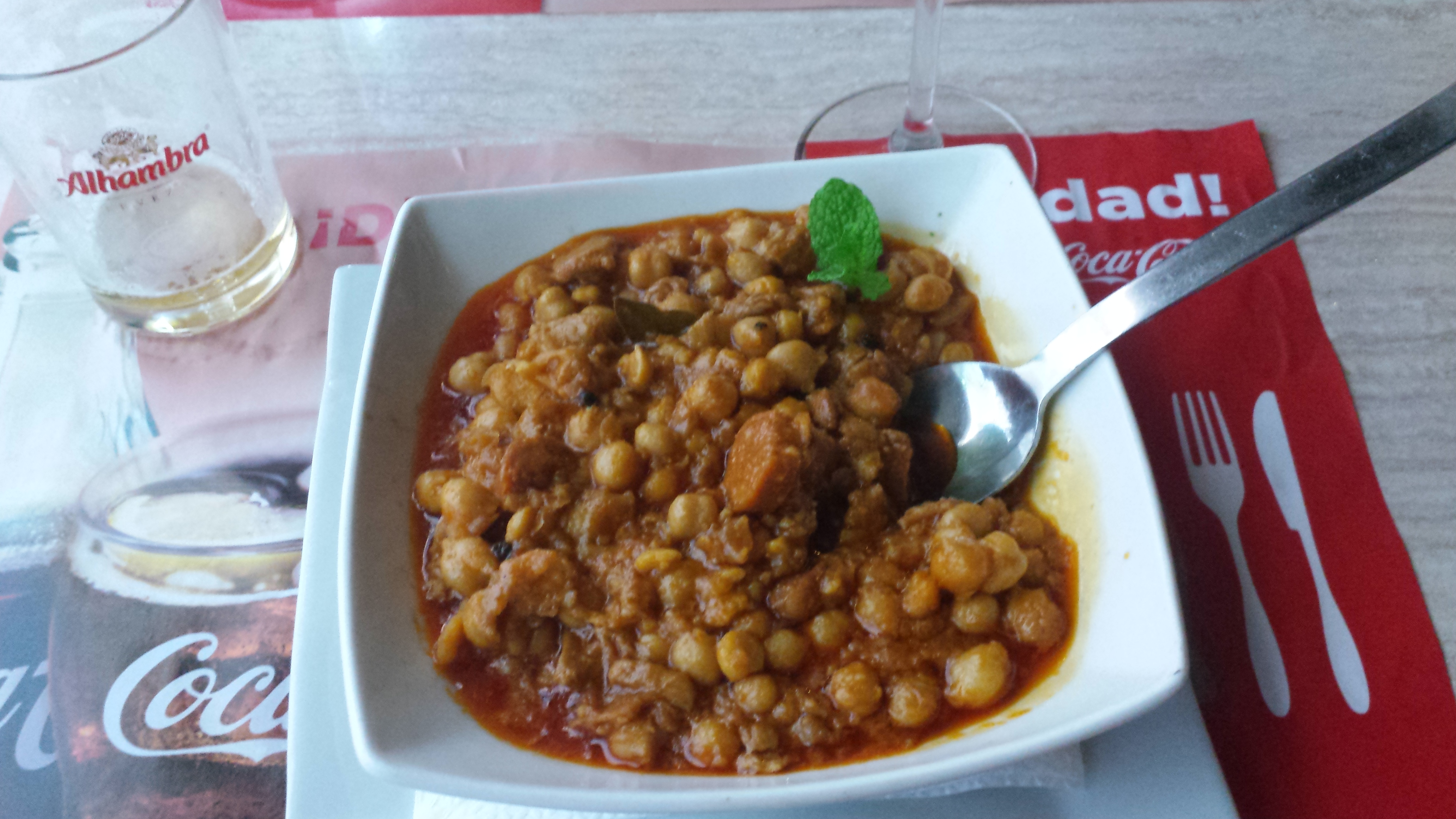 Un plato de menudo en Cádiz ciudad, España.